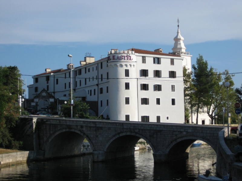 Hotel Kaštel, Crikvenica, Croatia